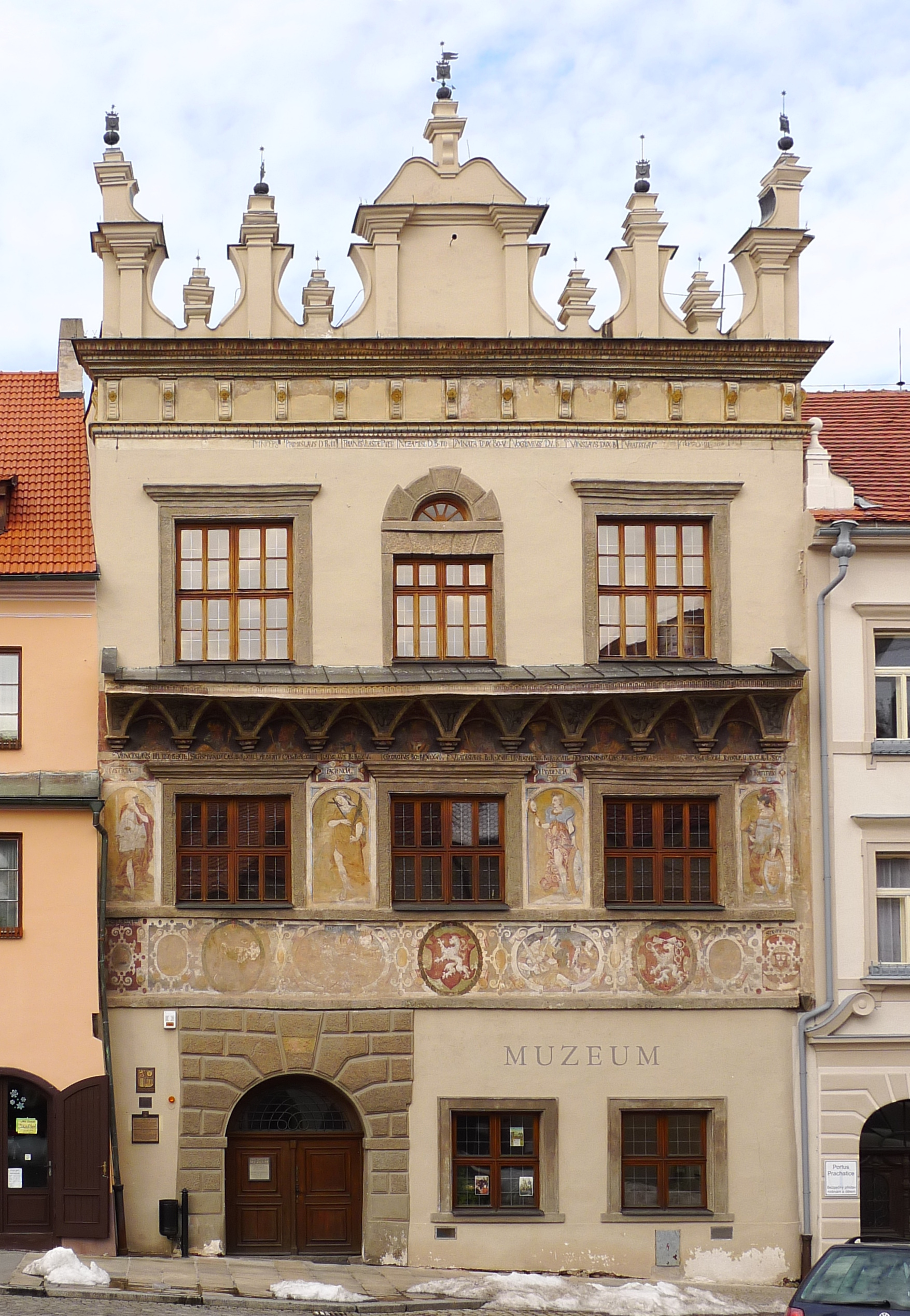 Měšťanský dům - Žďárských (Prachatice), Velké nám. 13, Prachatice